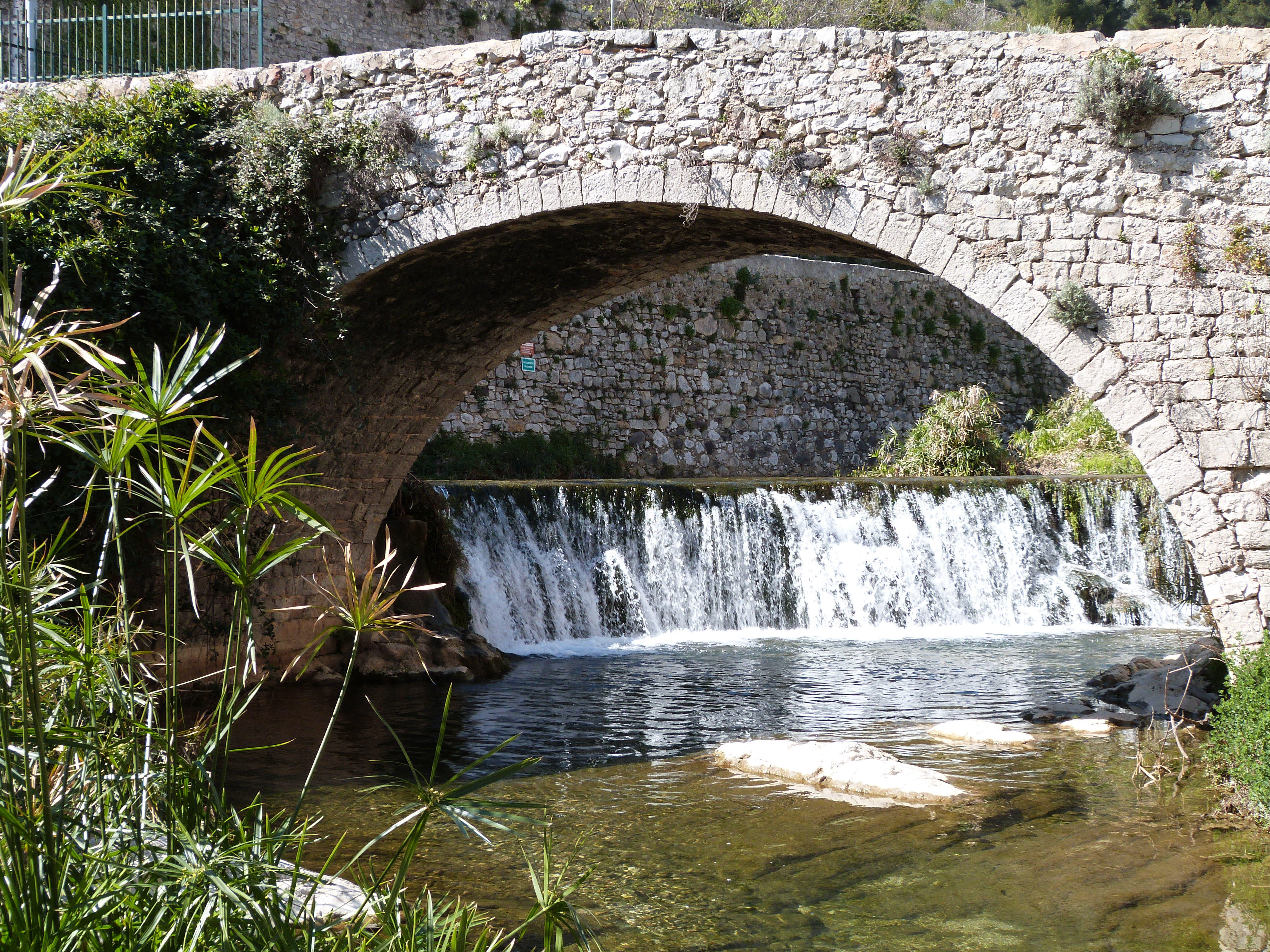 Ce pont permet de traverser la Reppe, à Ollioules. D'origine médiévale, c'était à l'époque un pont en dos d'âne.